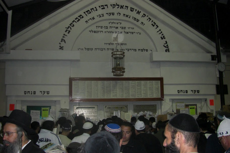 rabbi nahman tomb